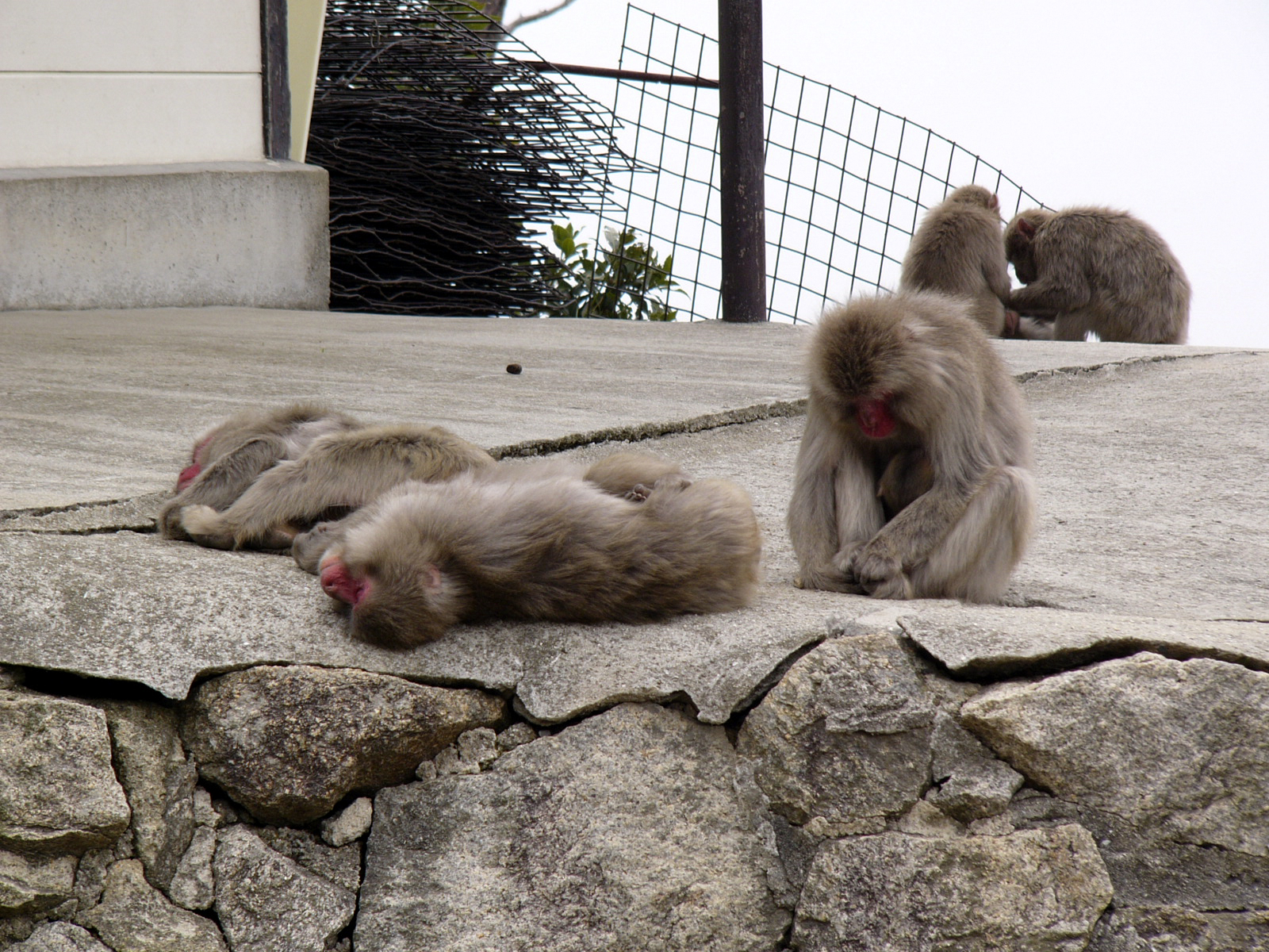 宮島ロープウェー獅子岩駅近くのニホンザル